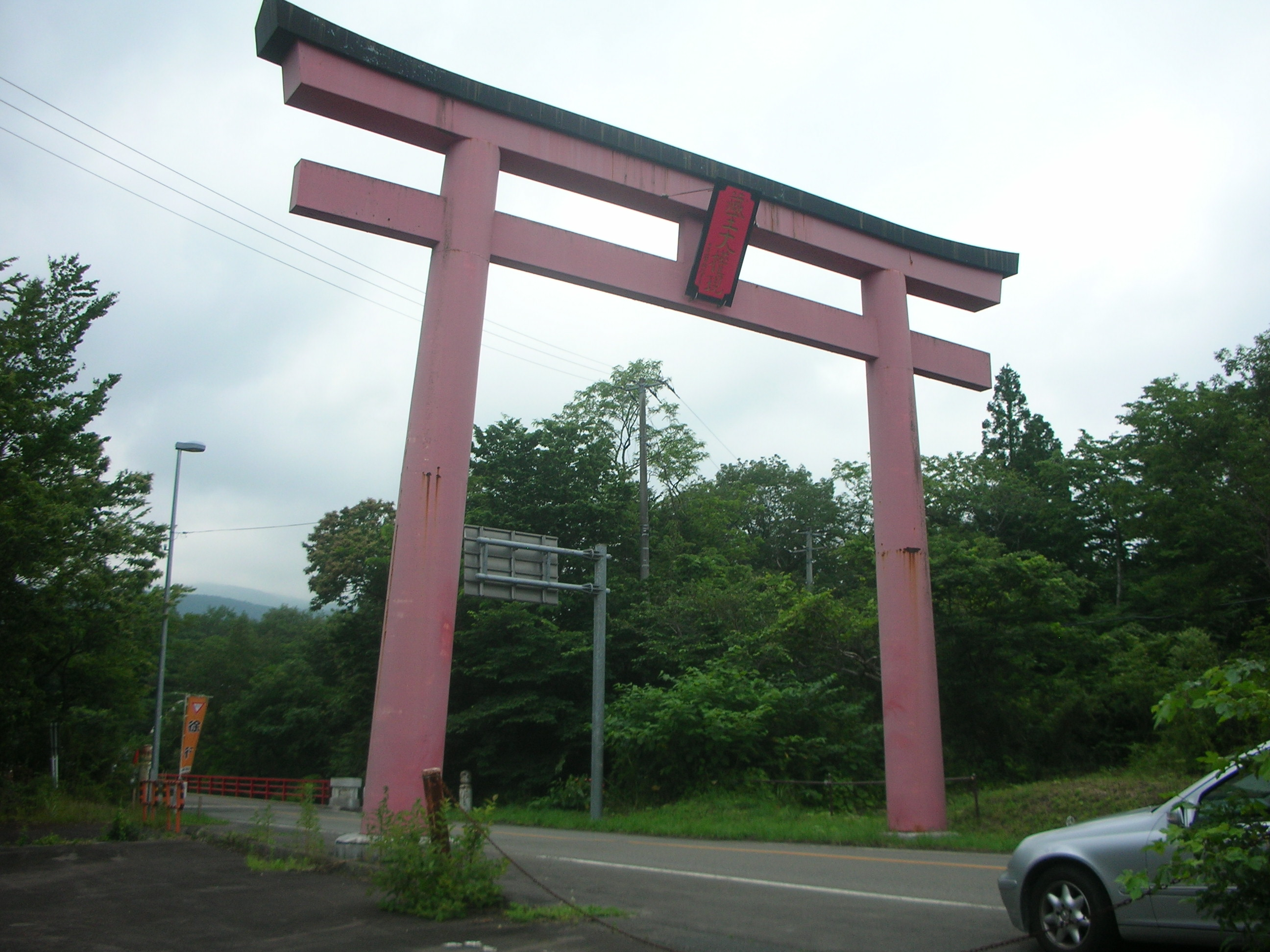 蔵王エコーライン入口の鳥居